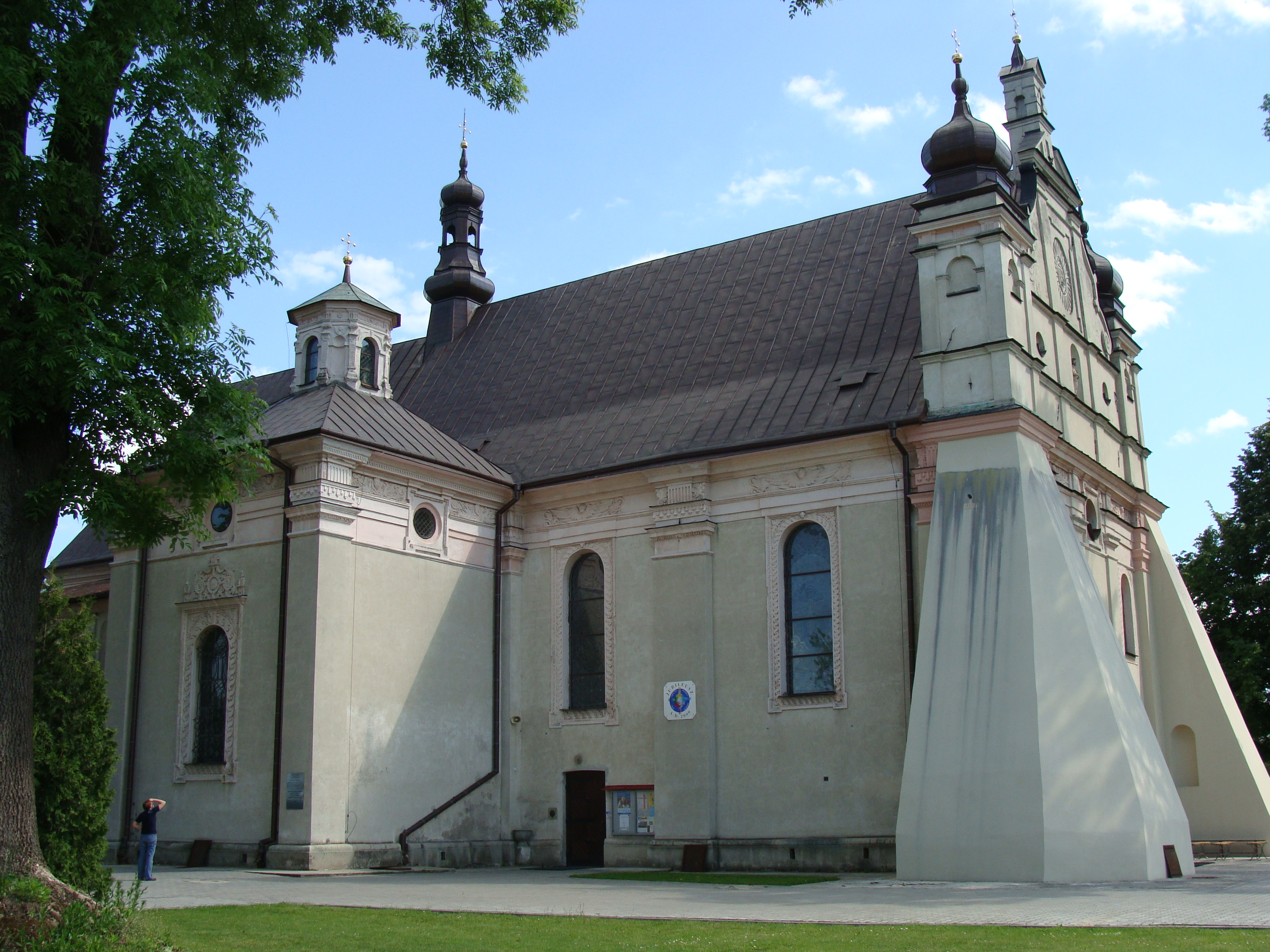 Turobin, ul. Kościelna 2 - kościół parafialny p.w. św. Dominika (zabytek nr rejestr. A/92 z 5.03.1960)